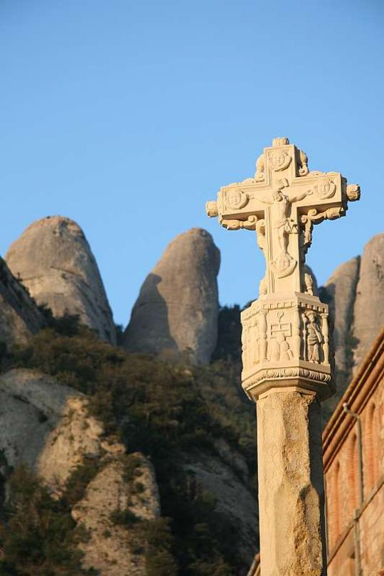 cross